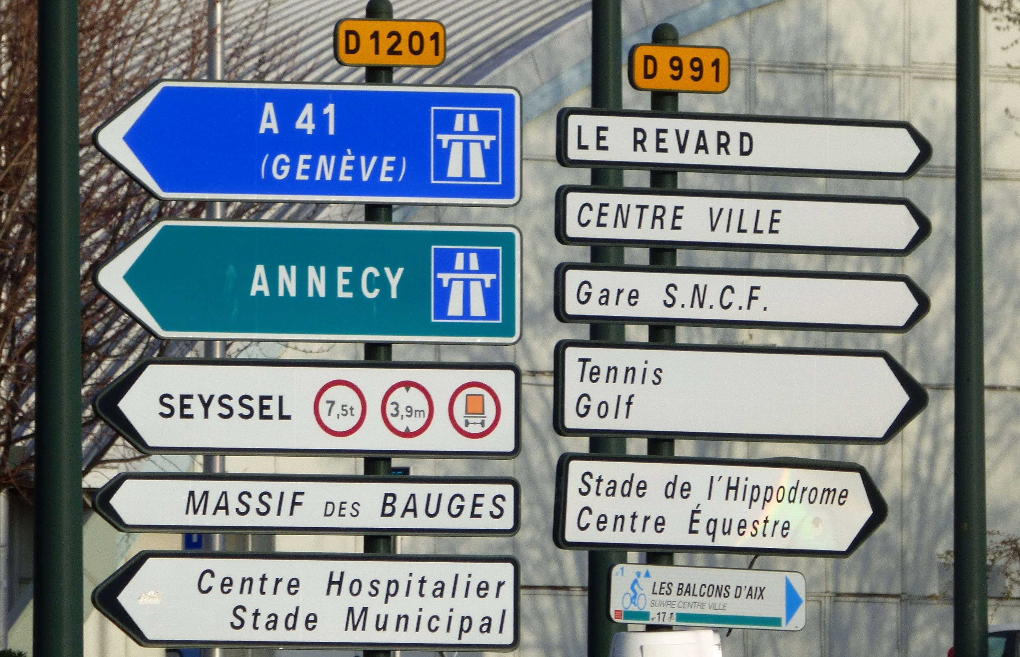 Panneaux de direction D21b (avec cartouches) à un carrefour giratoire à Aix-les-Bains (Savoie).